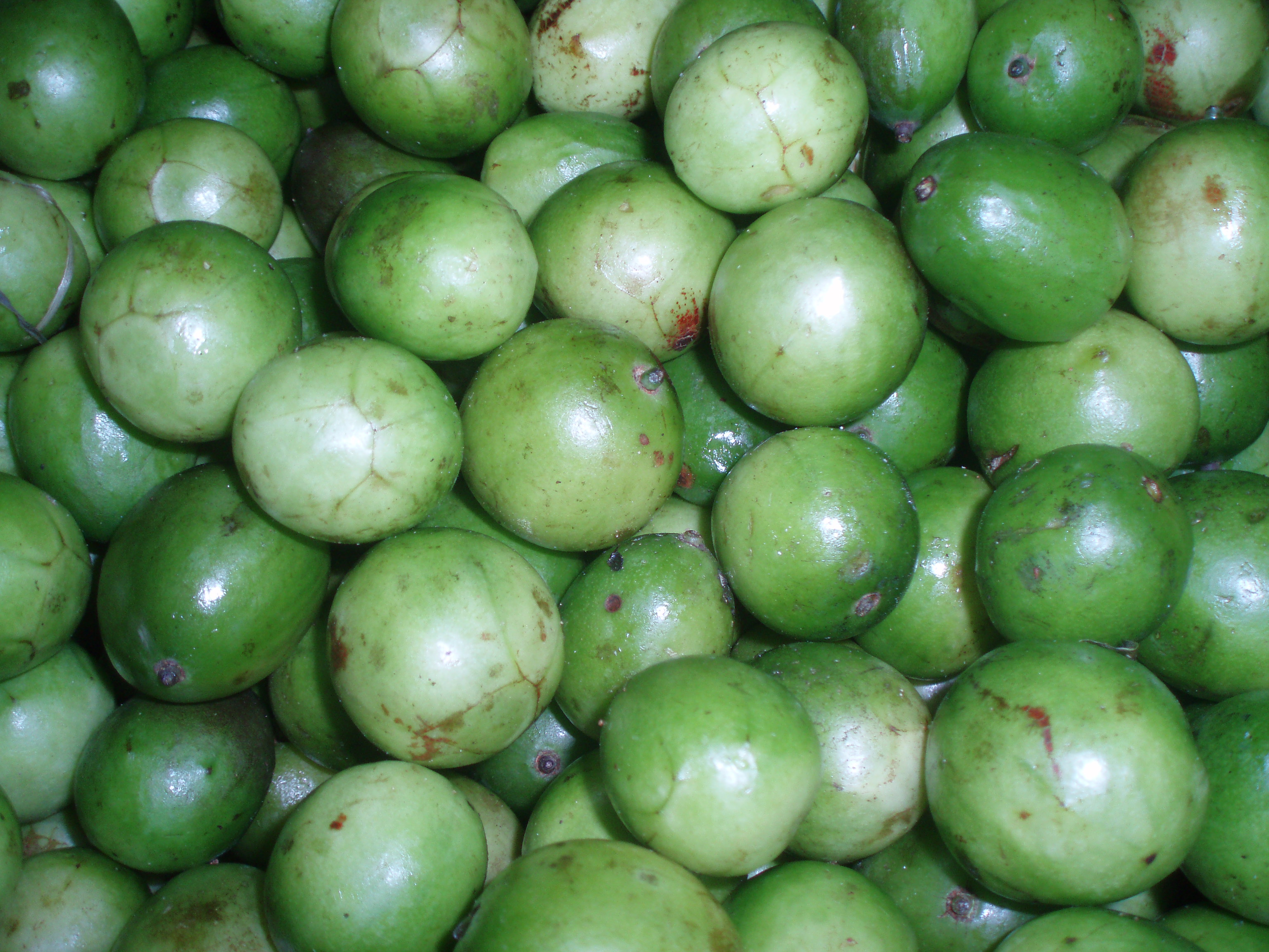 Spondias tuberosa (Umbu)